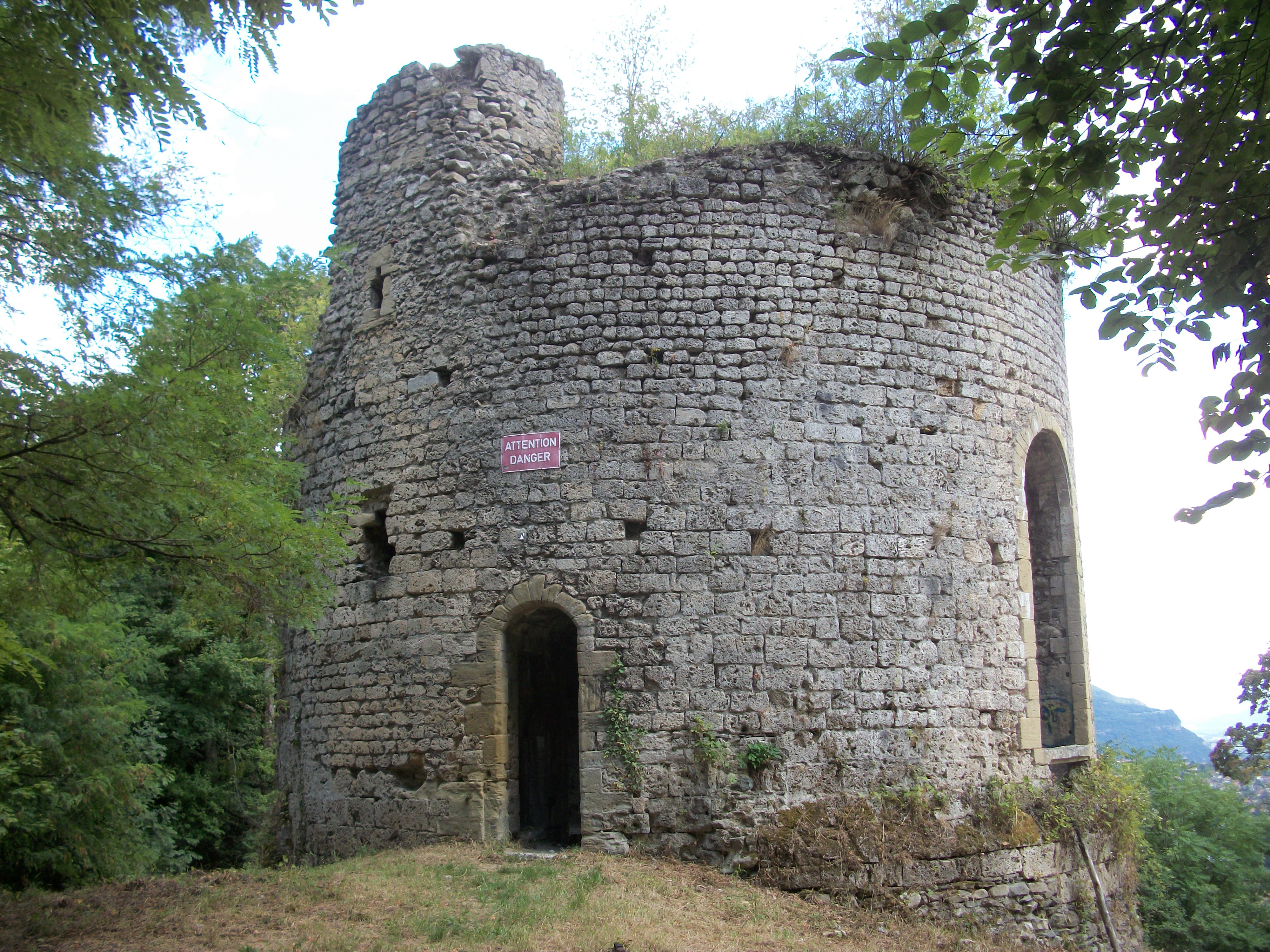 Tour Barral, dominant l'hôpital de Voiron, Isère, France Object location45° 22′ 08.76″ N, 5° 35′ 50.42″ E